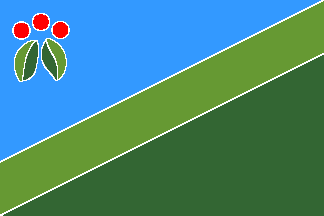 Bandera del municipio Sucre, estado Portuguesa, Venezuela